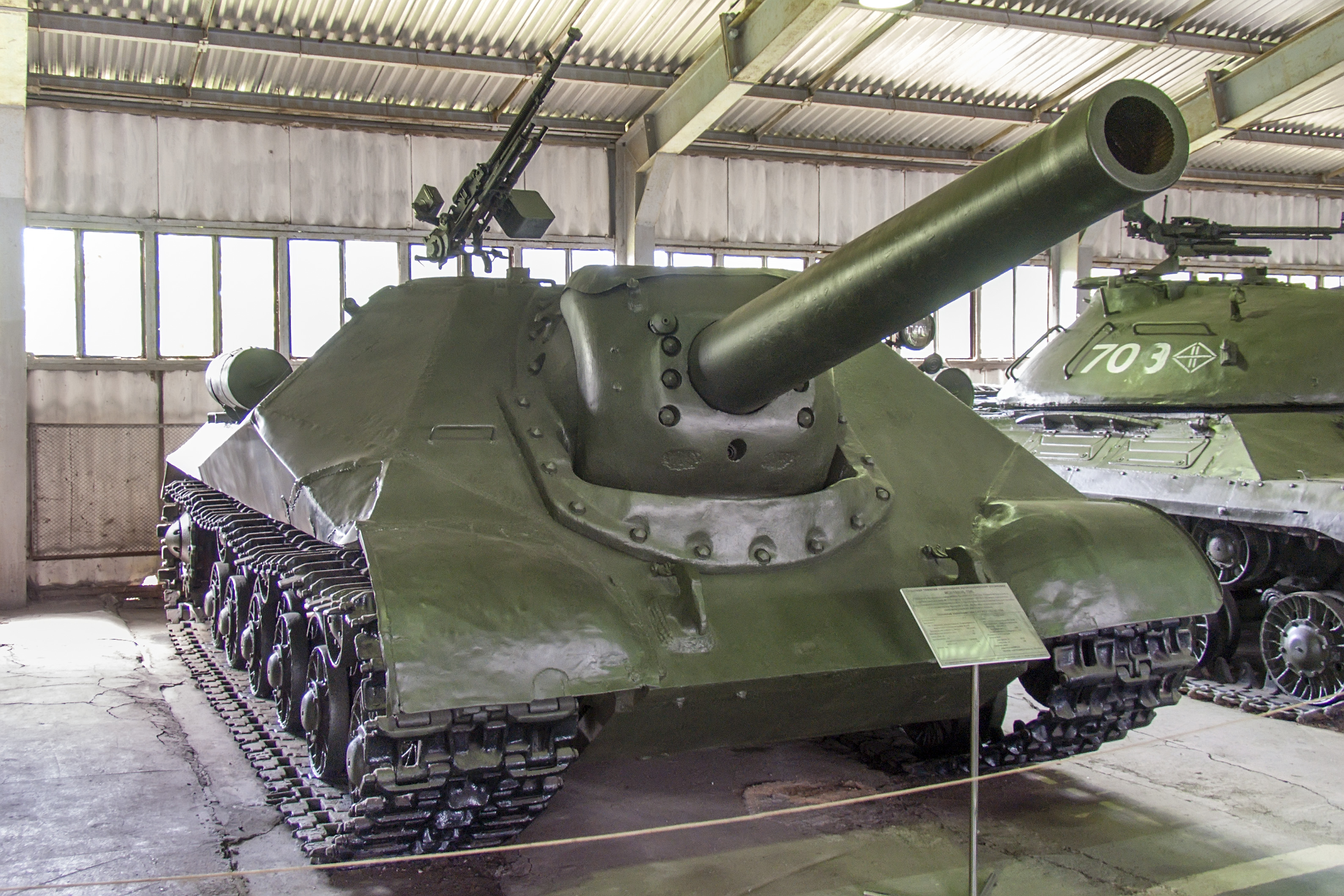 Самоходная установка объект 704 в Центральном музее бронетанкового вооружения и техники в Кубинке.